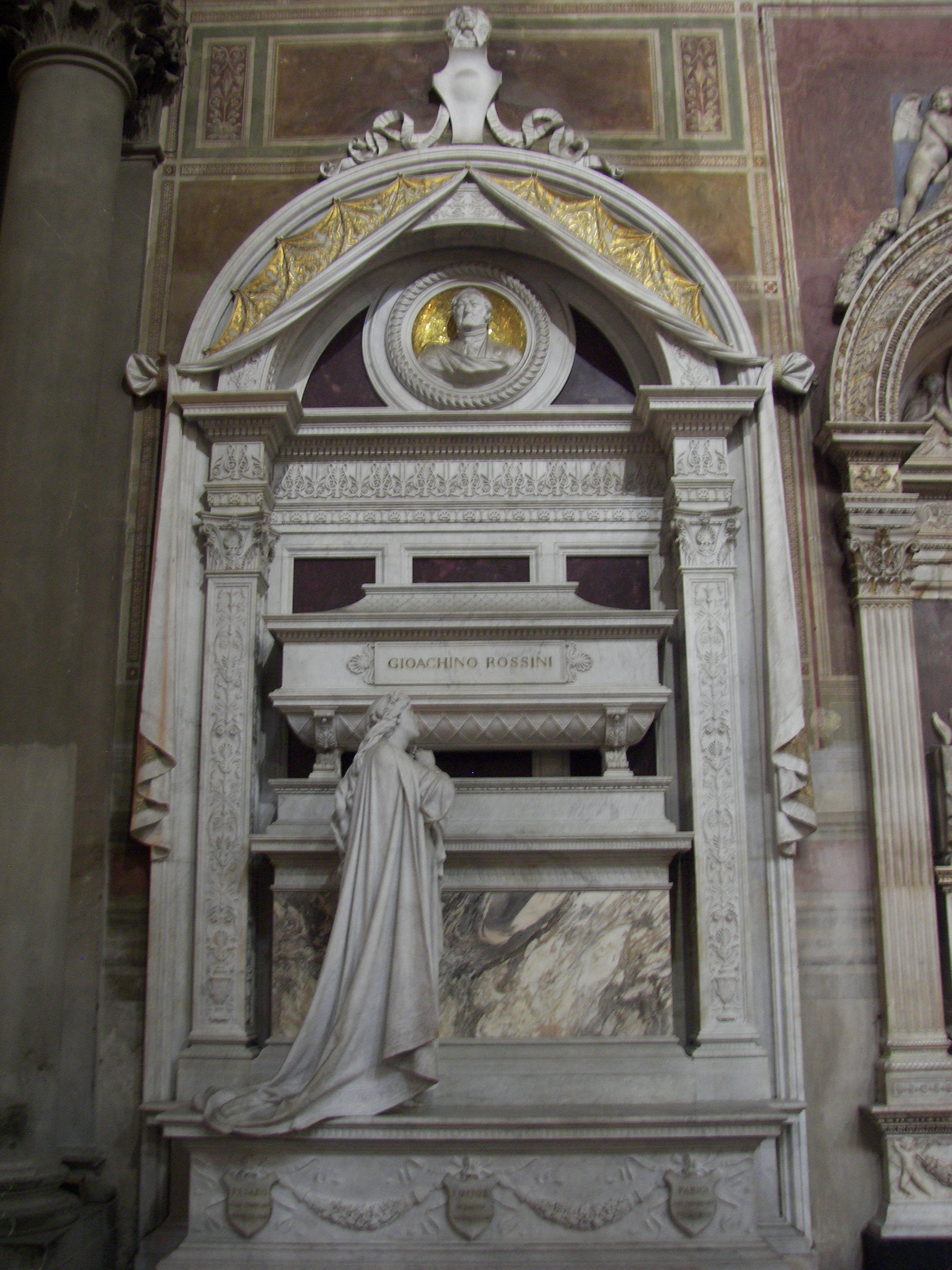 Grave of composer Gioacchino Rossini in Santa Croce in Firenze.